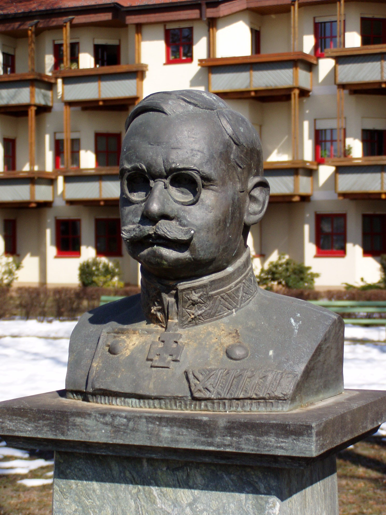 Ludwig Hülgerth, Büste im Hülgerth-Park, Klagenfurt, Carinthia